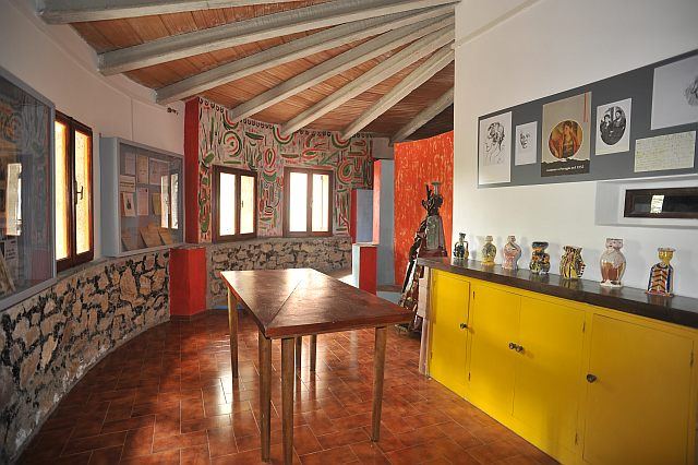 Interno della Brajta, nel Fuseum, il Centro d'arte di Brajo Fuso.